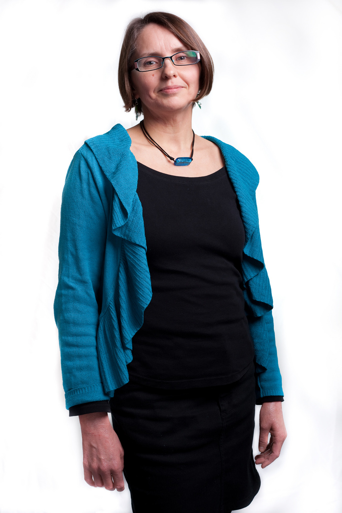 Gunn-Vivian Eide Foto: Ole Morten Melgård Høgoppløysleg versjon